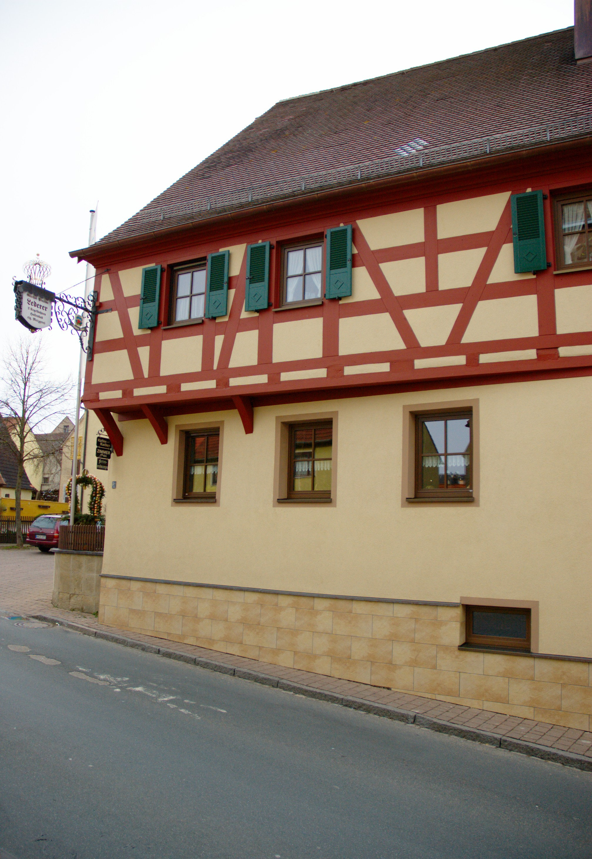 Mitteleschenbach